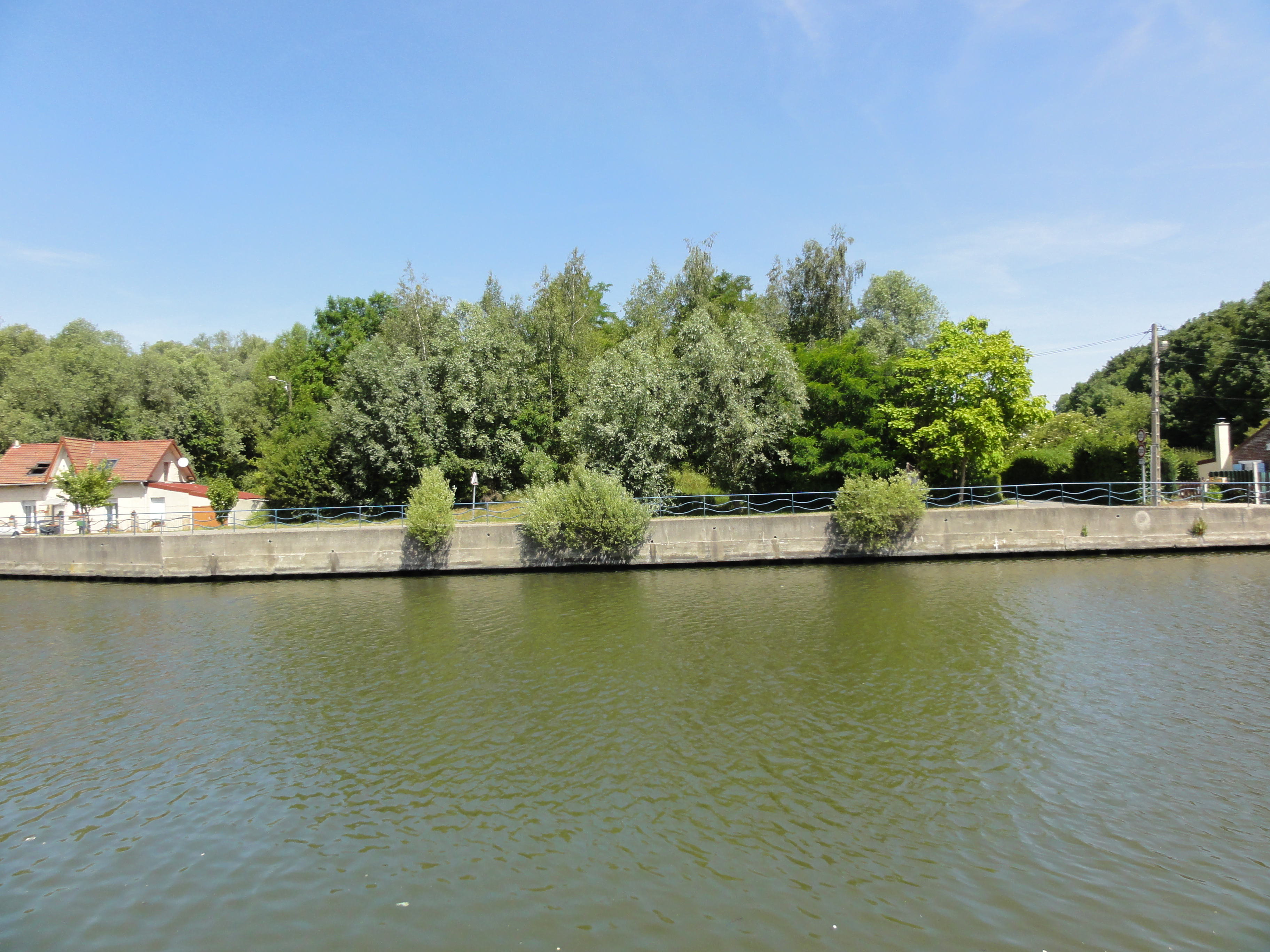 Terril n° 248 dit Cavalier du 24 d'Estevelles, fosse n° 24 - 25 de la Compagnie des mines de Courrières dans le bassin minier du Nord-Pas-de-Calais, Estevelles, Pont-à-Vendin et Annay, Pas-de-Calais, Nord-Pas-de-Calais, France. Le terril no 248 est inscrit sur la liste du patrimoine mondial de l'Unesco le 30 juin 2012 et y constitue en partie le site no 51.